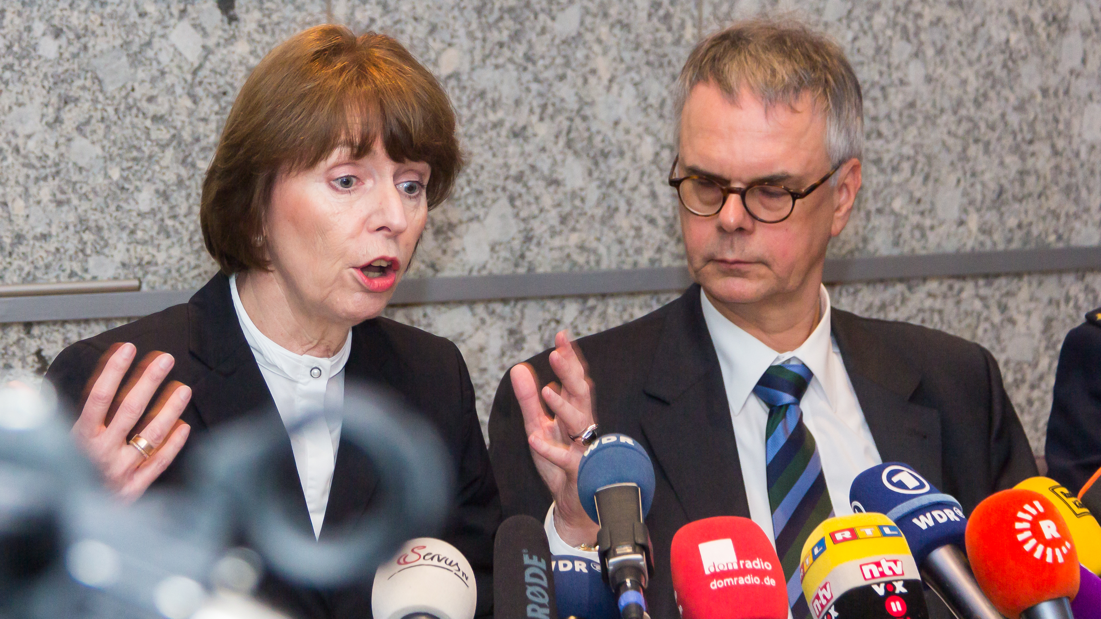 Pressekonferenz im Rathaus Köln zu den Vorgängen in der Silversternacht 2015/16 Foto: Oberbürgermeisterin Henriette Reker, Polizeipräsident Wolfgang Albers